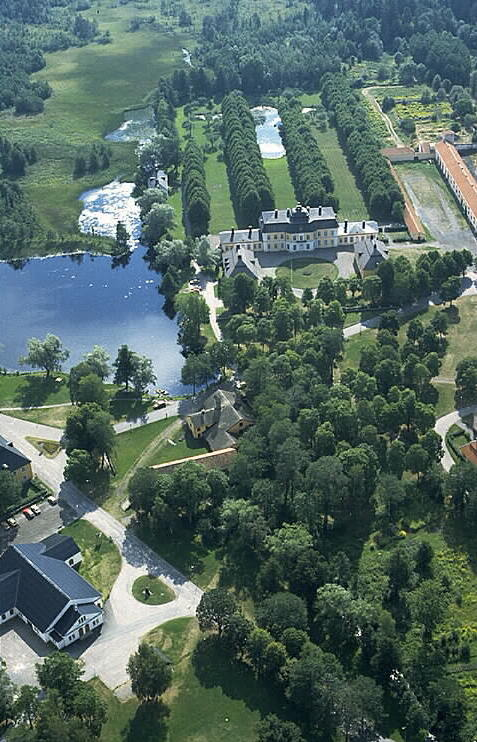 Motiv: Österbybruk Nyckelord: Byggnadsminnen, Flygbilder, Riksintressen Kategori: Bruksmiljö .